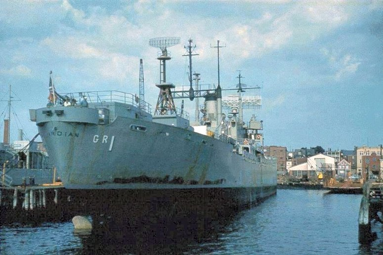 USS Guardian (AGR-1)